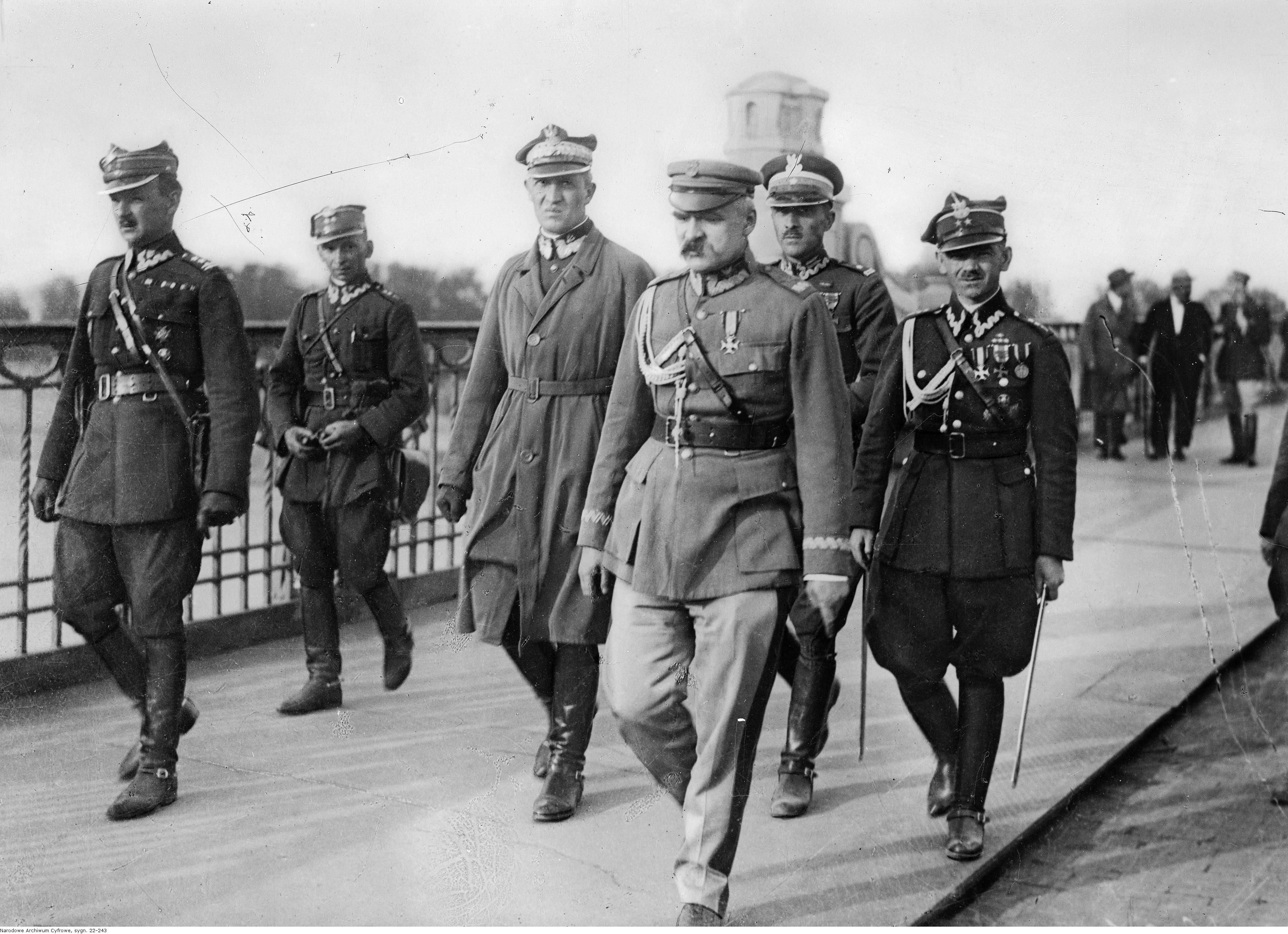 Marszałek Józef Piłsudski (3. z lewej) w otoczeniu oficerów na moście Poniatowskiego udaje się na spotkanie z prezydentem Stanisławem Wojciechowskim. Widoczni od lewej: podpułkownik Kazimierz Stamirowski, porucznik Marian Żebrowski, generał Gustaw Dreszer-Orlicz, major Tadeusz Jaroszewicz oraz porucznik Michał Galiński.